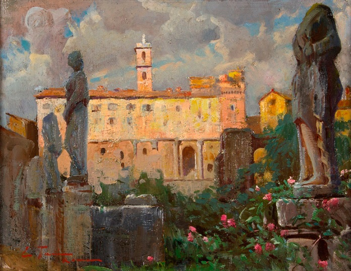 Veduta dal Foro del Campidoglio, olio su cartone, cm 27 x 35, coll. privata